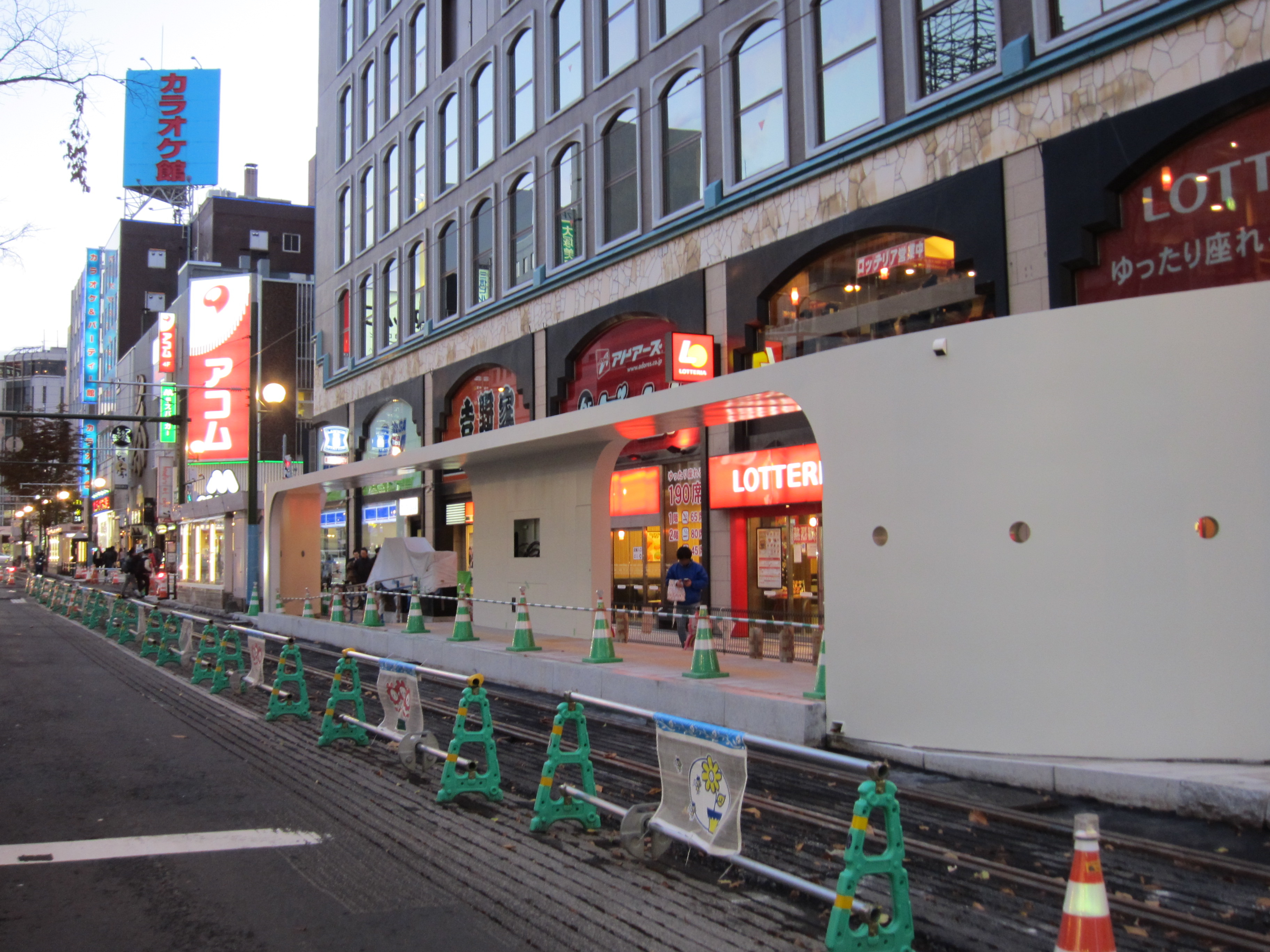 札幌市電の2015年ループ化工事によって新設される狸小路停留場（狸小路4丁目側）。